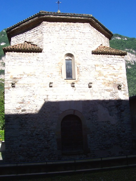 Riva San Vitale - Battistero